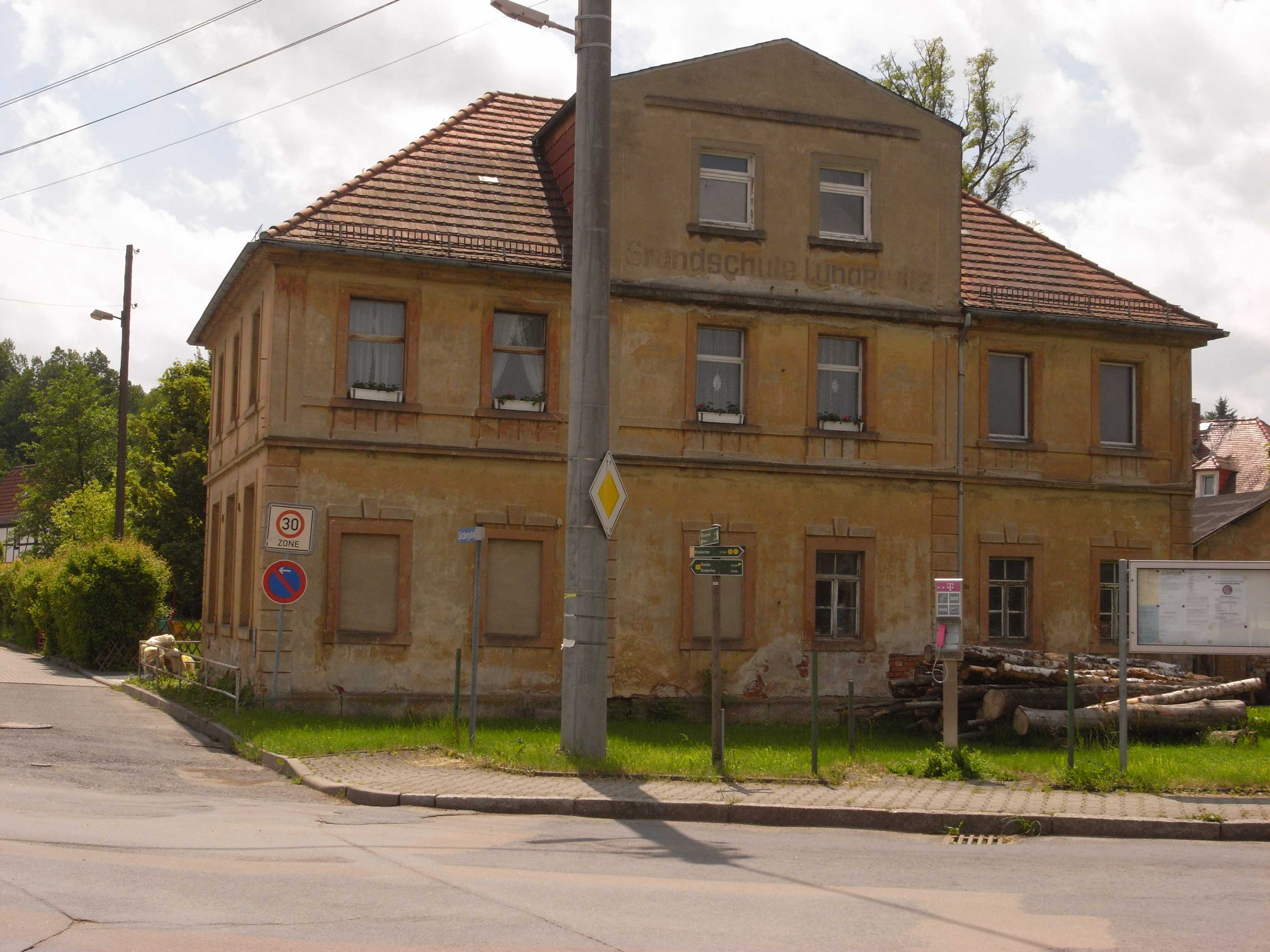 Kreischa-Lungkwitz, alte Schule für Lungkwitz und Wittgensdorf (erbaut 1859, erweitert 1886), (Sachsen, Deutschland)